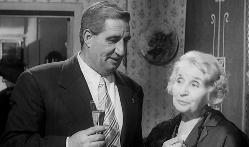 Mario Carotenuto and Emma Gramatica in a scene of the film Il mio amico Benito